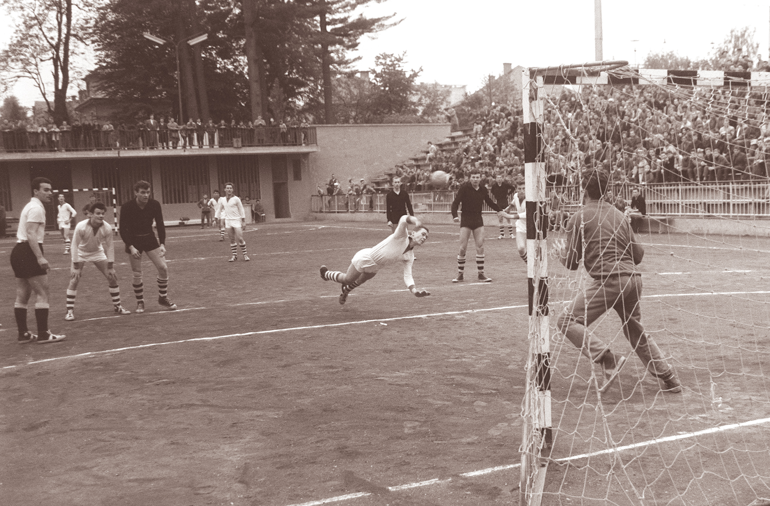 Rokometna tekma Branik-Rudar.